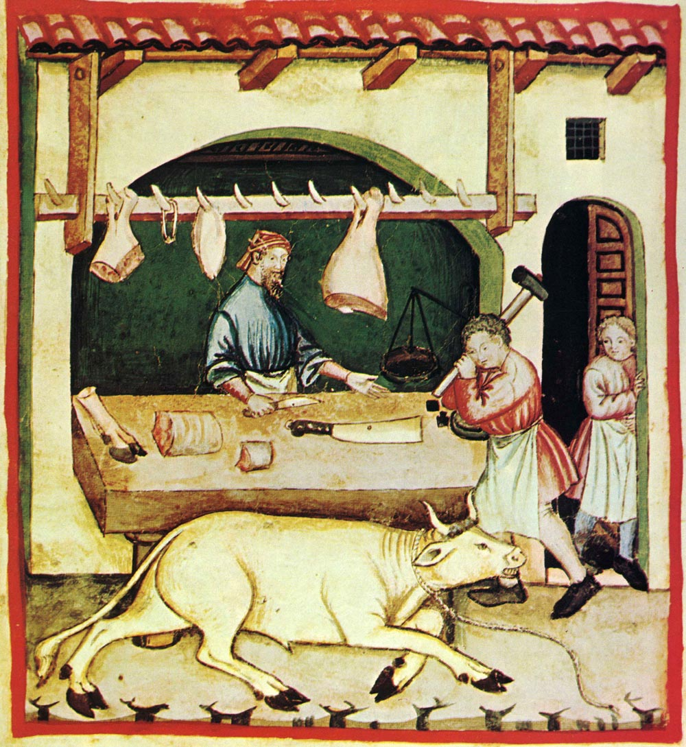 12-alimenti, carni bovine, Taccuino Sanitatis, Casanatense 418